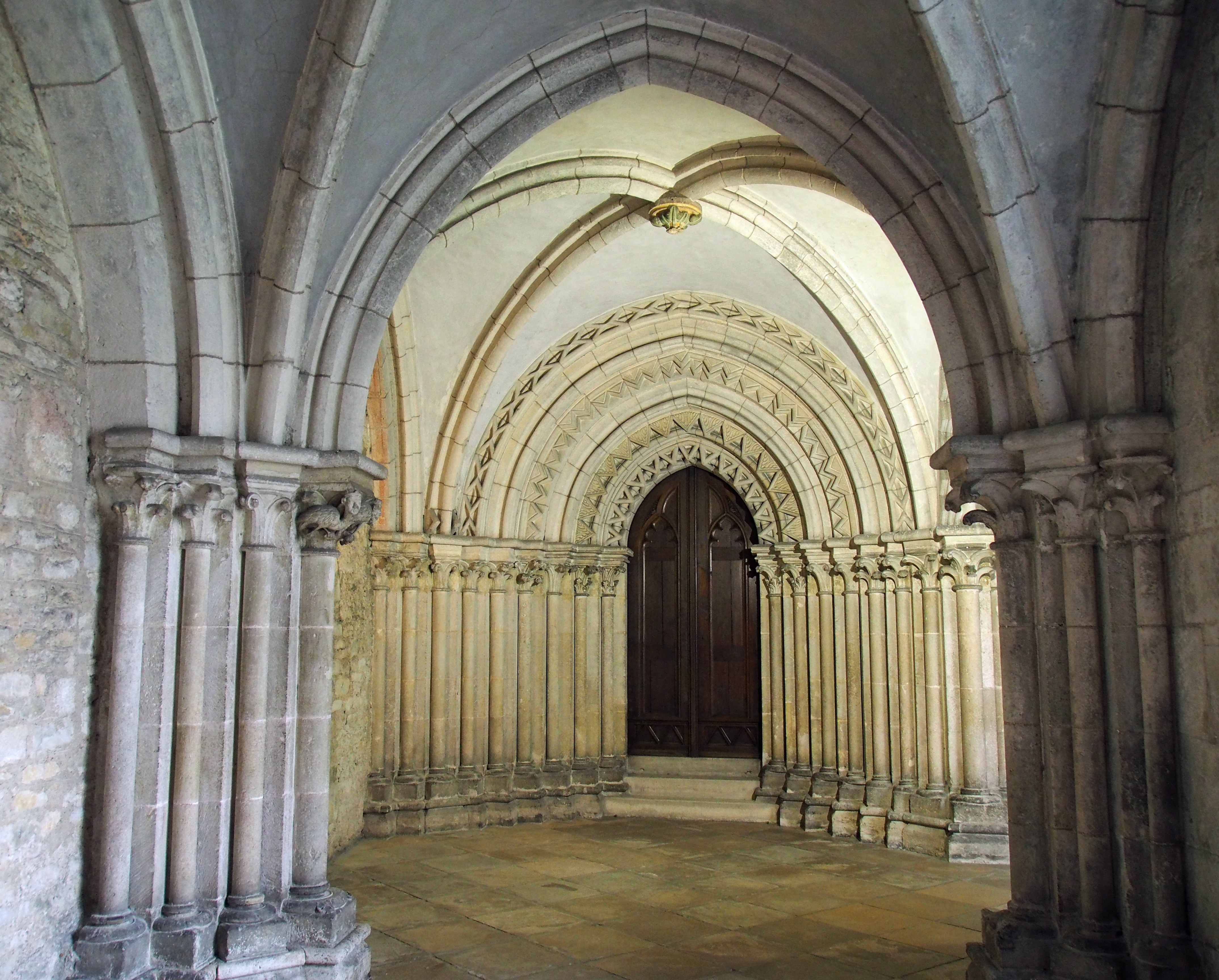 Eingang zum Kreuzgang im Kloster St. Emmeram, Regensburg